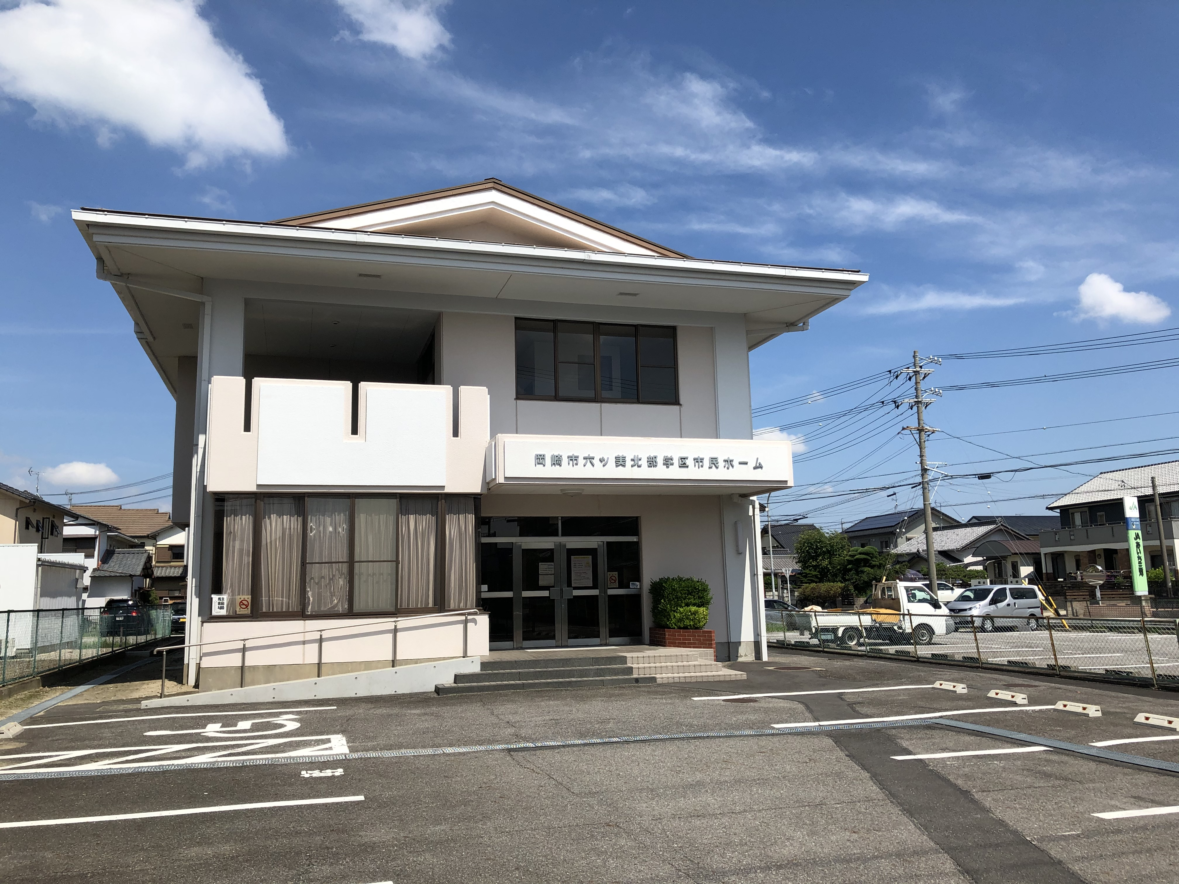 六ツ美北部学区市民ホーム（岡崎市井内町）